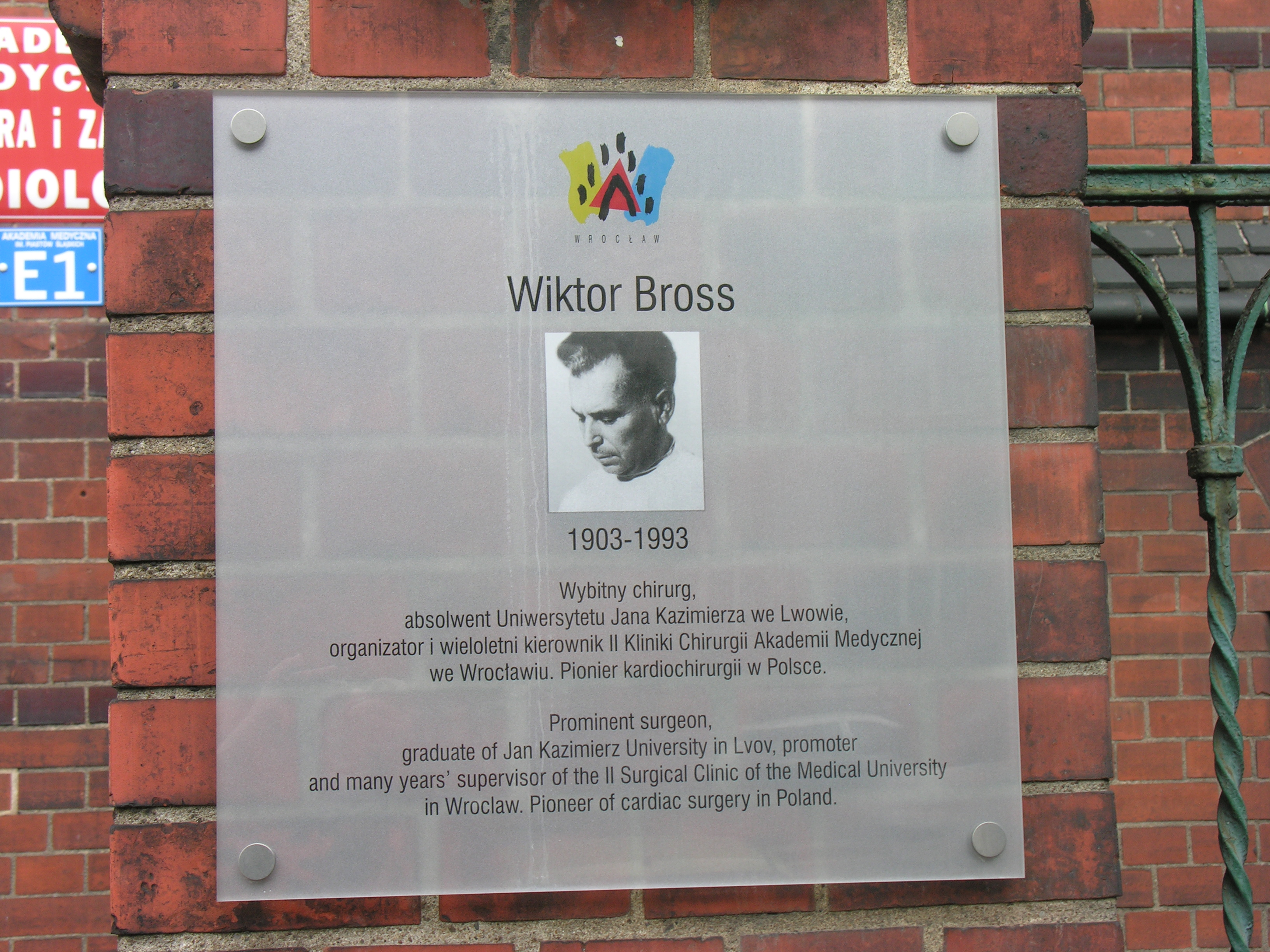 Tablica ku czci Wiktora Brossa we Wrocławiu, ul. Curie-Skłodowskiej 68